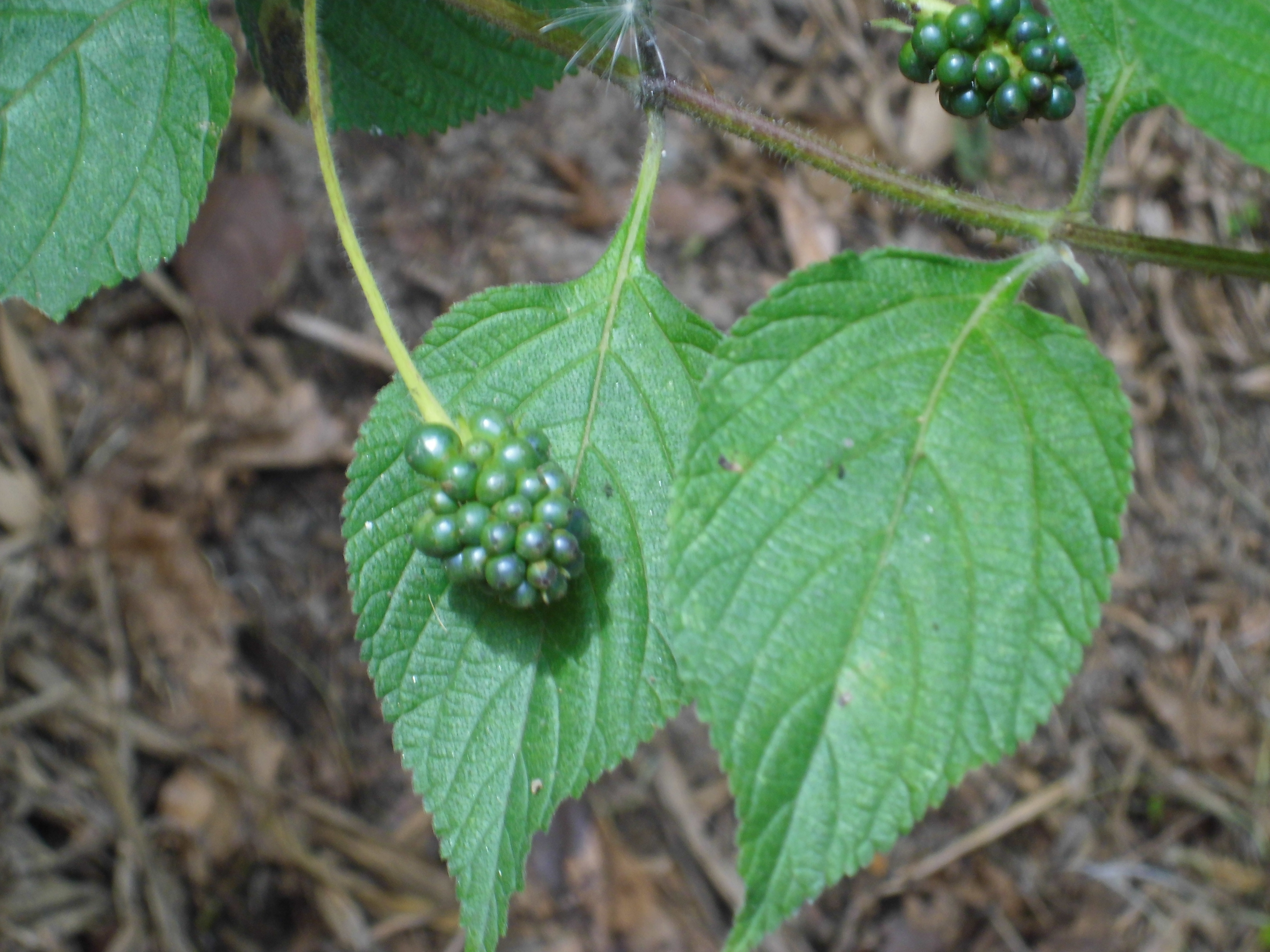 Lantana camara en La Lagunita, municipio El Hatillo, estado Miranda - Venezuela.